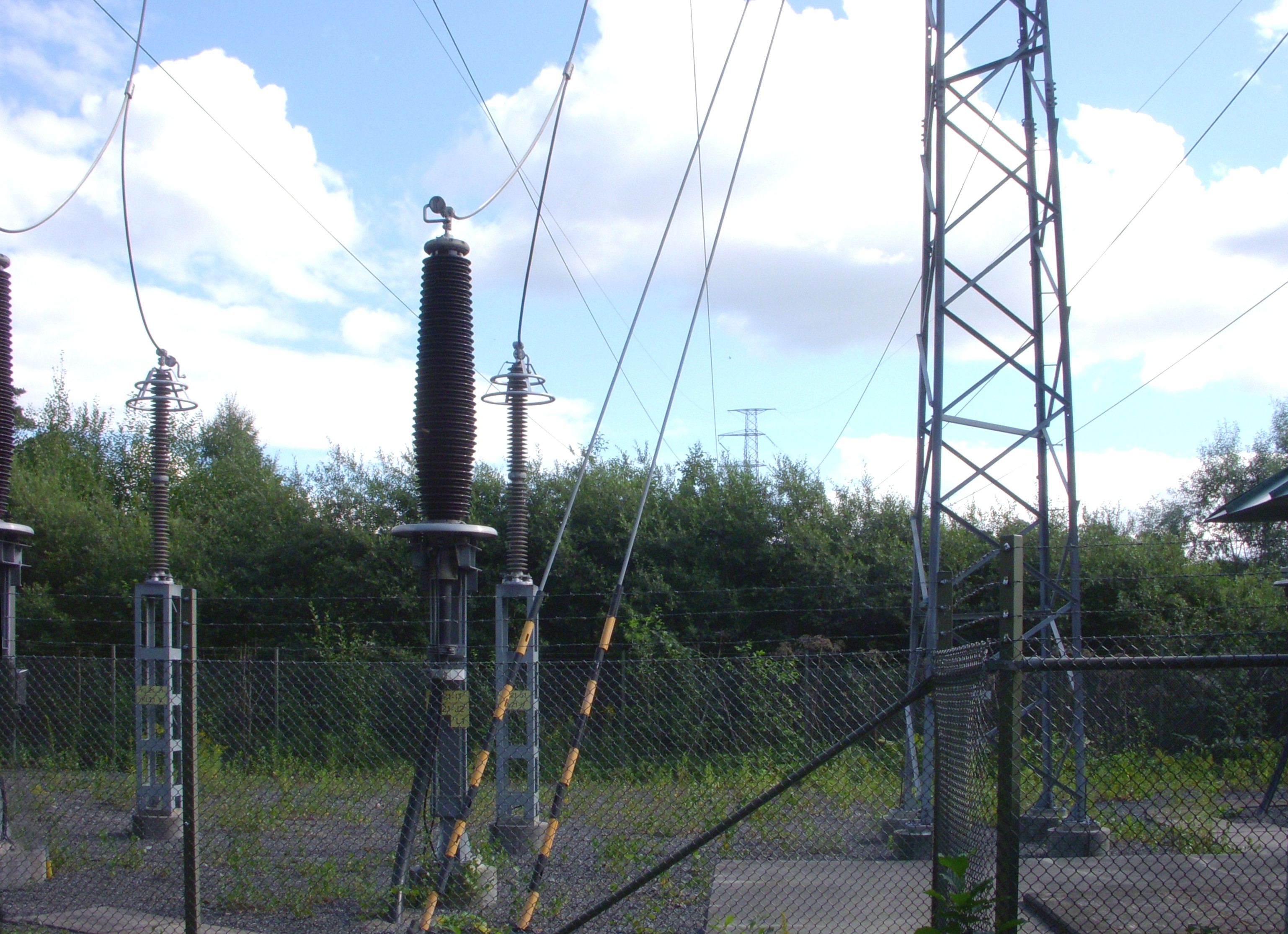 Kraftledning Untran-Värtan går ner i bergtunnel vid Ålkistan